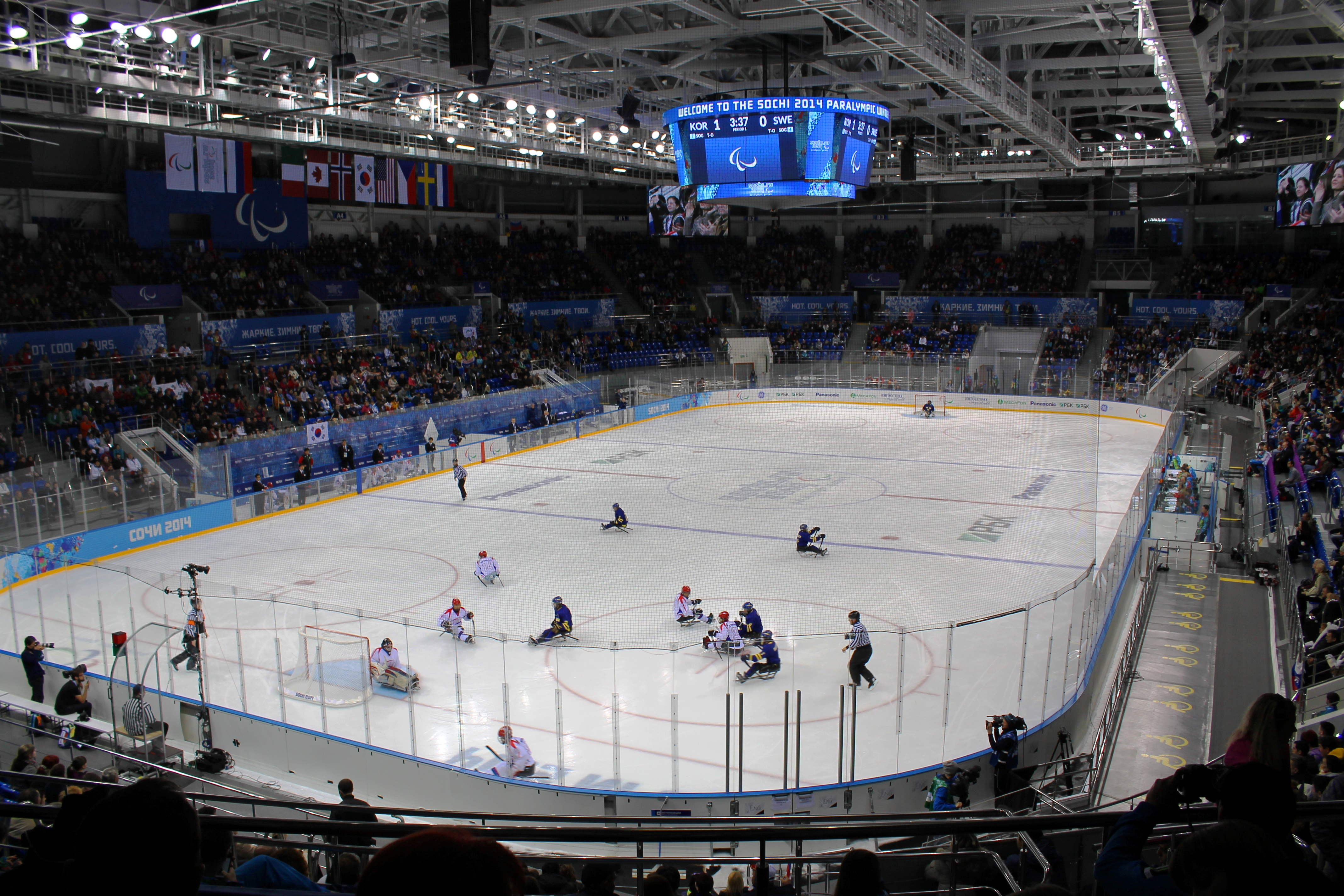 Арена Шайба. Следж хоккей между сборными Ю. Кореи и Швеции во время зимних Паралимпийских мгр 2014 в Сочи.